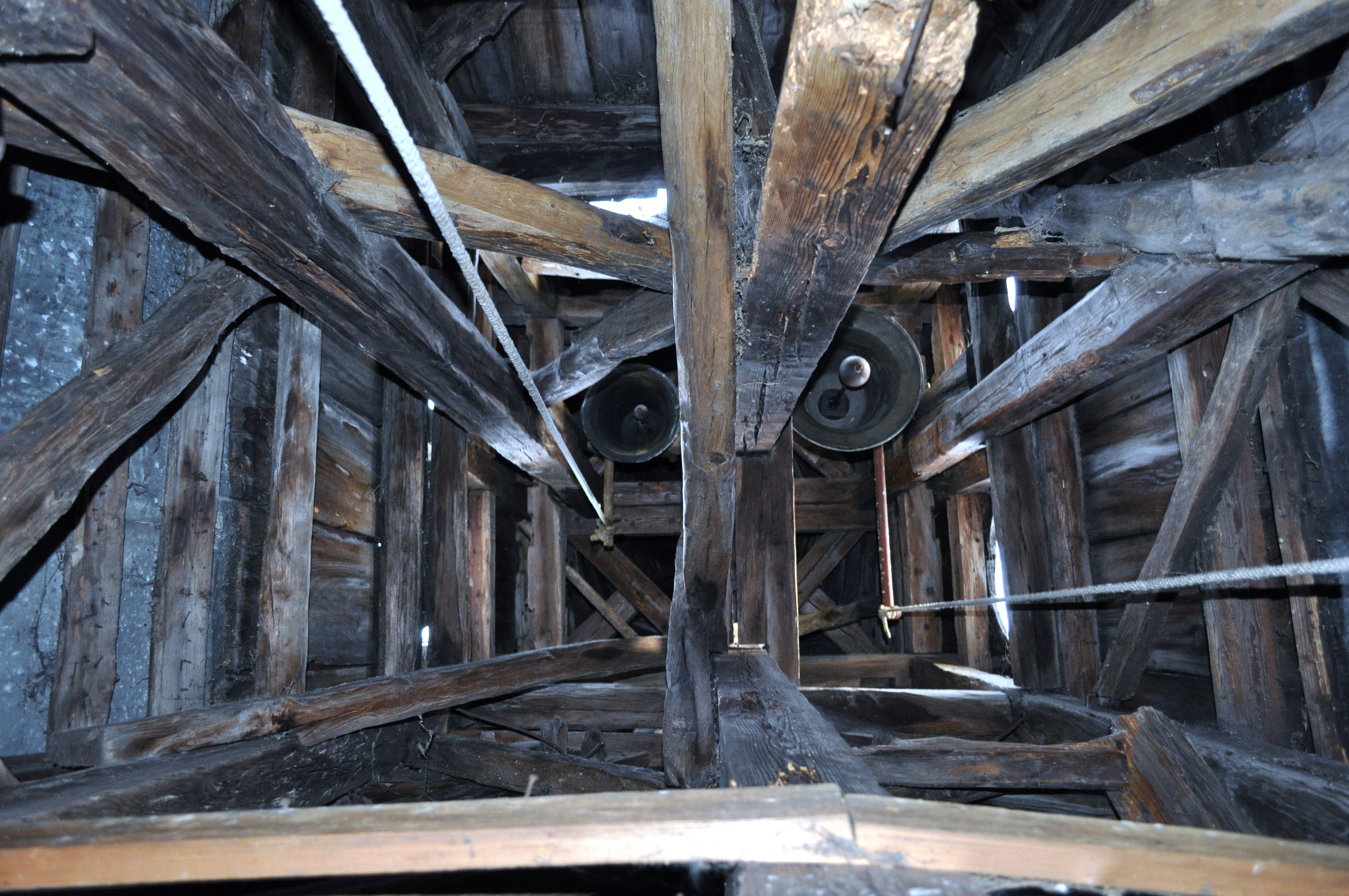 Biserica de lemn din Ciurila, județul Cluj